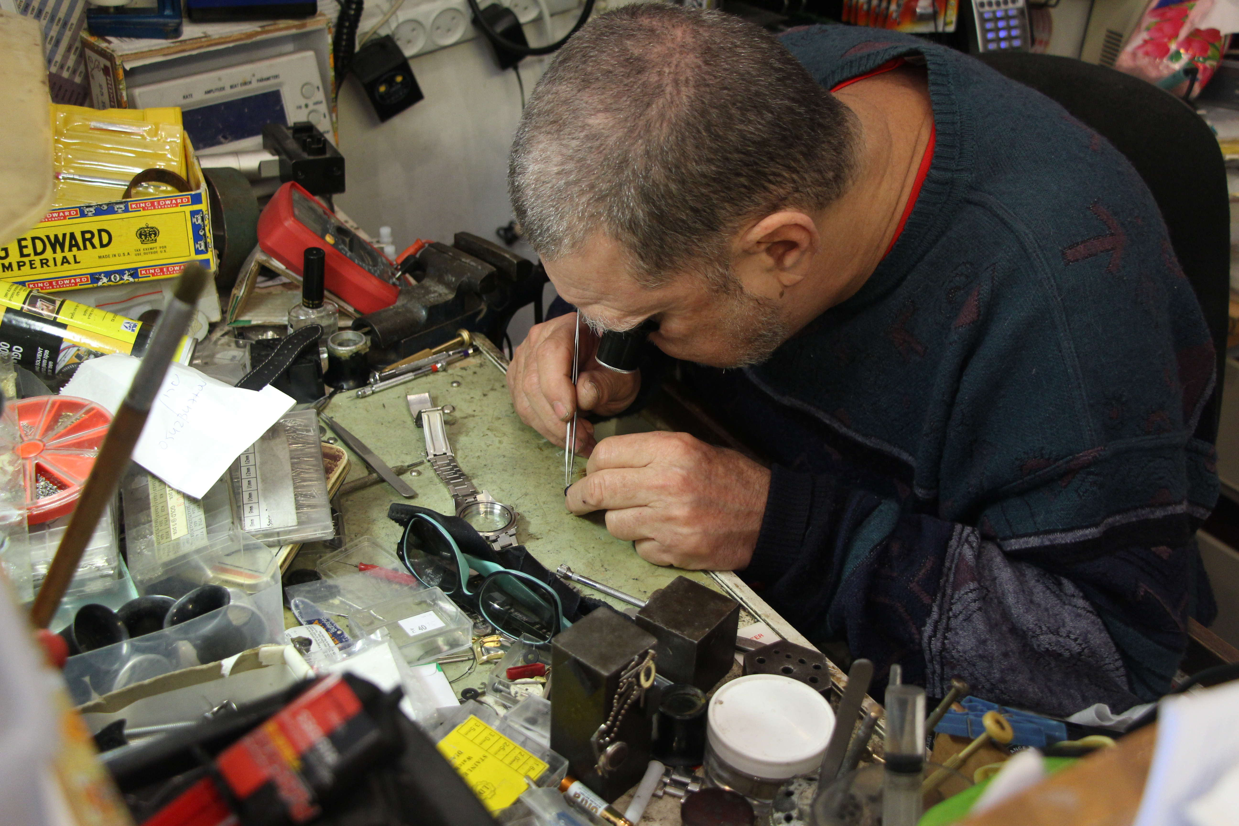 שמואל פרקש 1 צילום תיכון רוטברג